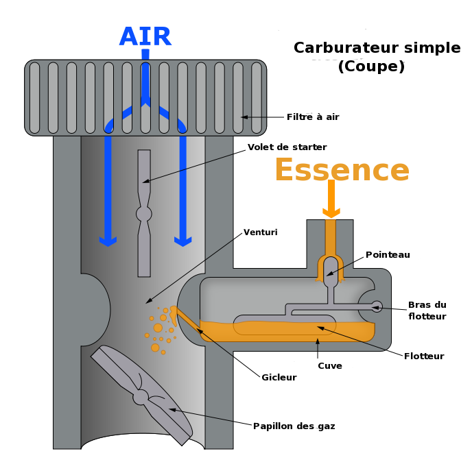 Coupe d'un carburateur simple